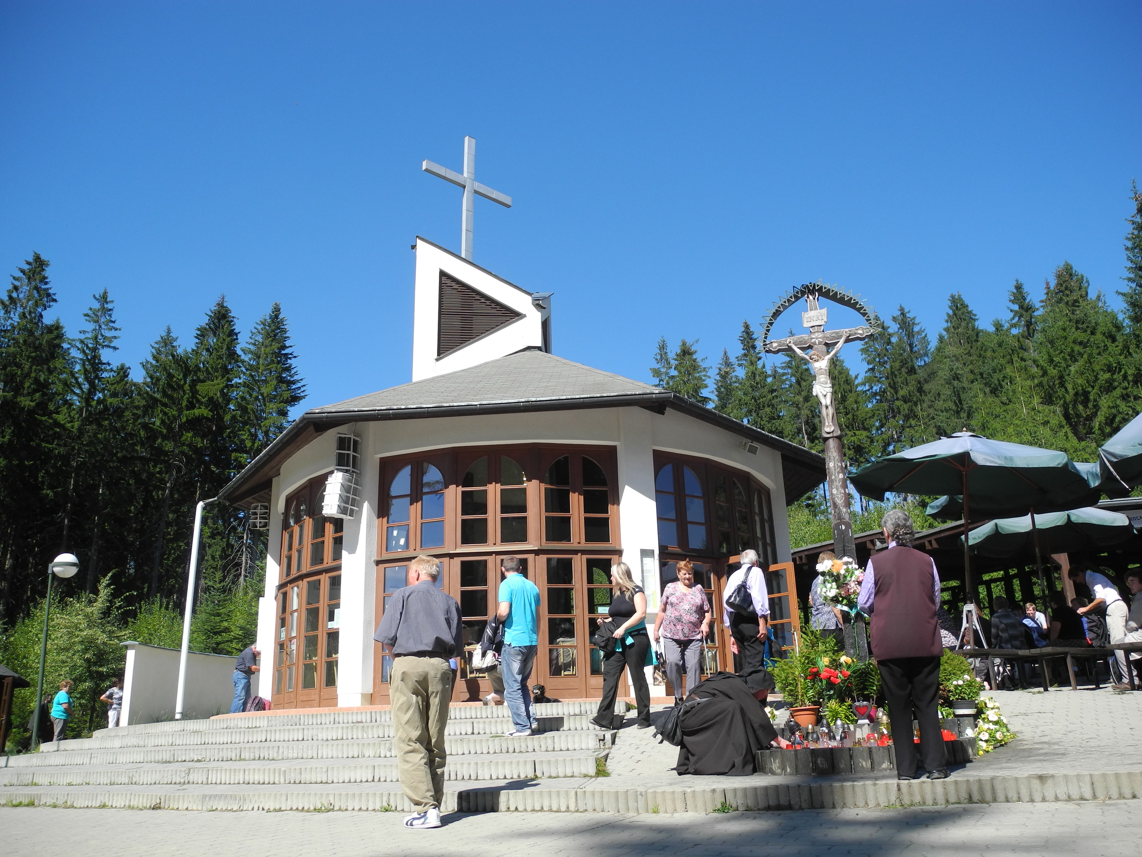 Fotografie z Turzovky